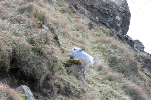 Mountain Hare, Gásadalur